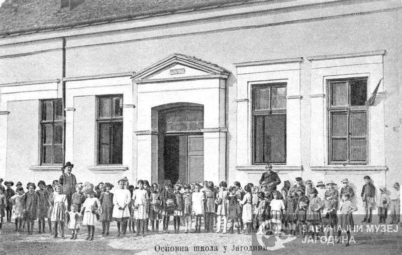 "Успоменар", приредили Р.Петровић Шумар и Н.Станојловић, Јагодина 2014.